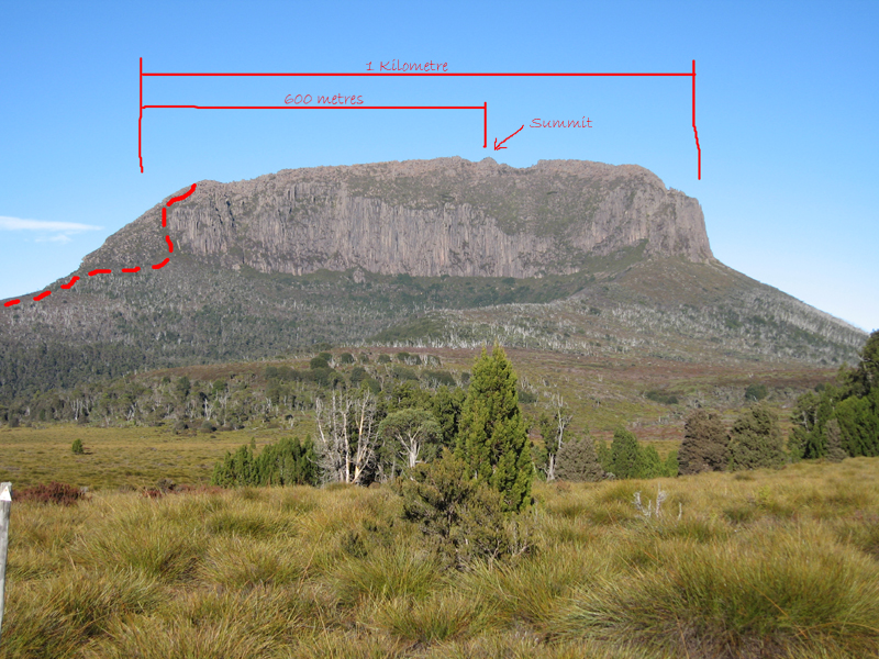 Mt Pelion West - distances